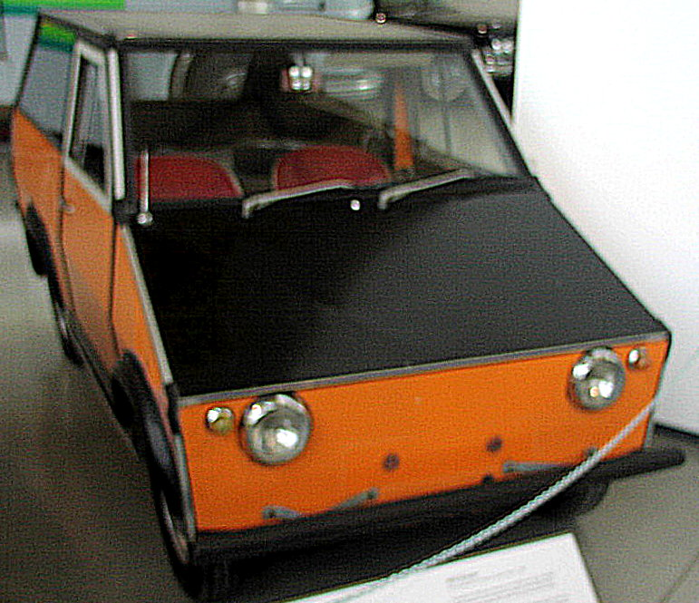 AWS Shopper (1970)